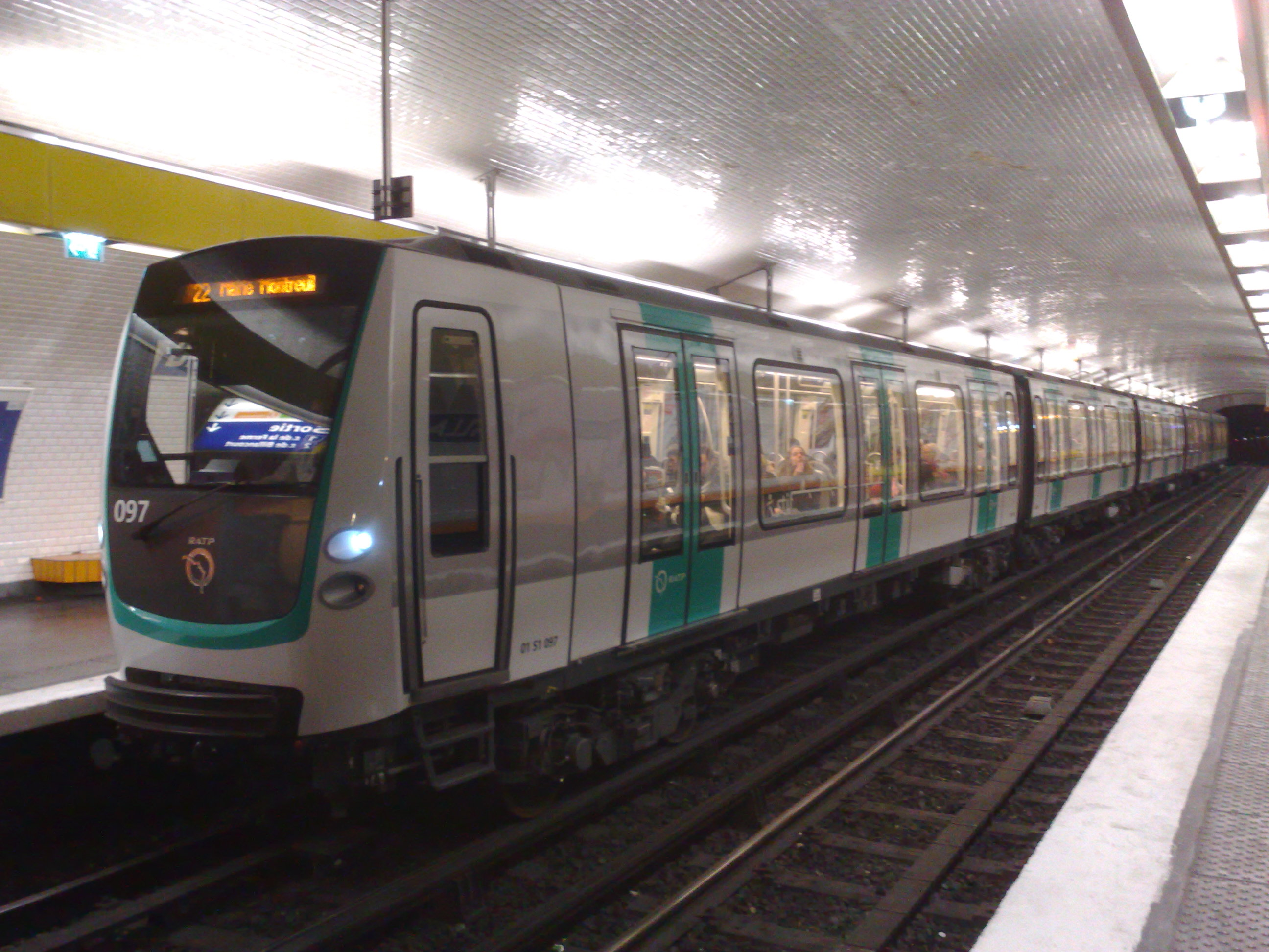 Rame MF01 du métro parisien à la station Billancourt sur la ligne 9, en direction de Mairie de Montreuil.